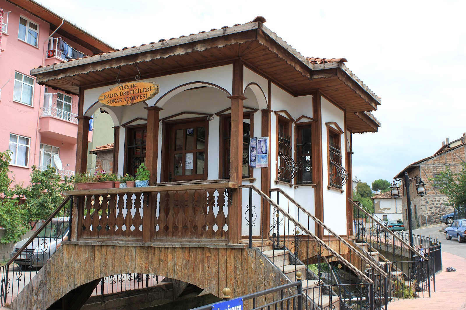 Tokat ilinin bir ilçesi olan Niksar şehir merkezinde bulunan bir Osmanlı mimari örneğini taşyan evden görünüm.